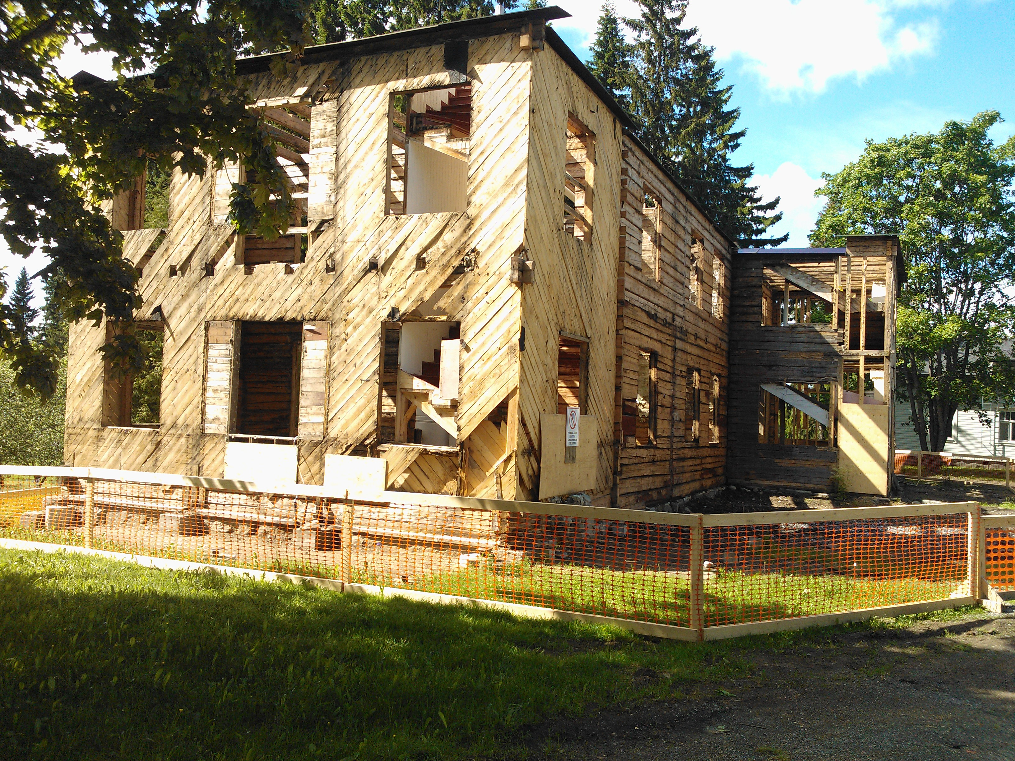 Ново-Валаамский монастырь. Дом настоятеля после пожара (18 марта 2011)